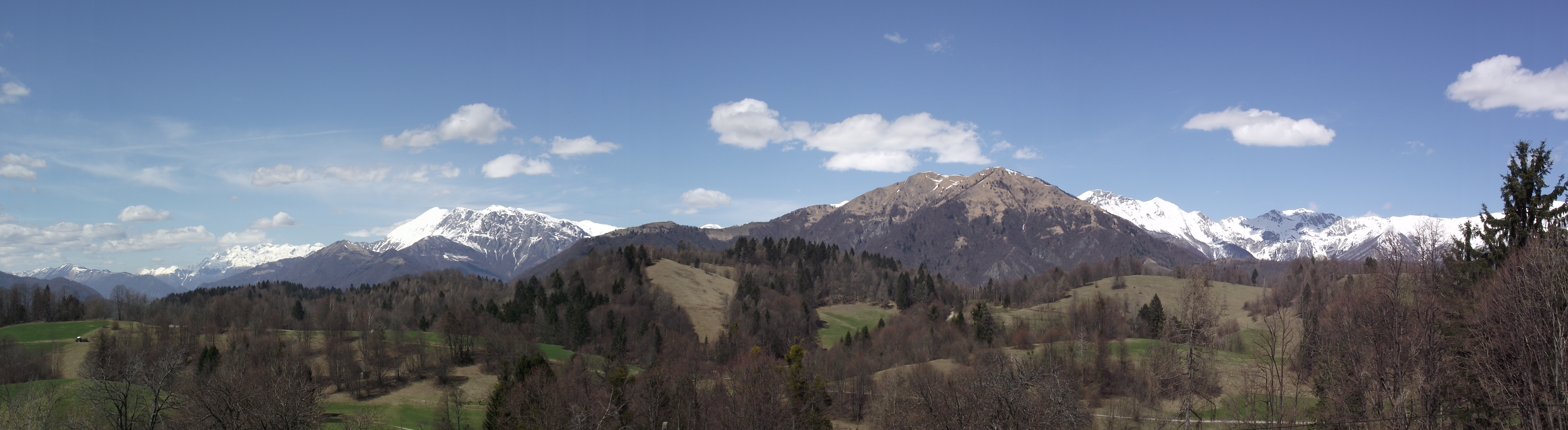 Ponikve